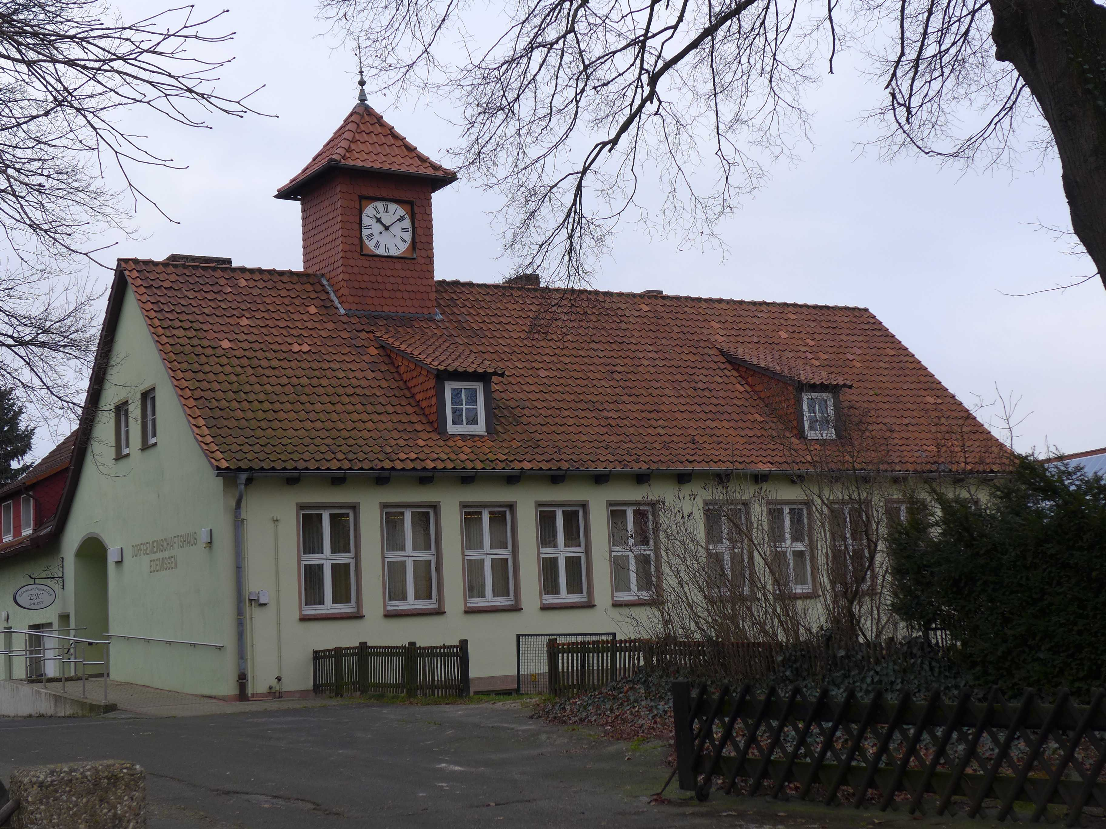 Edemissen DGH